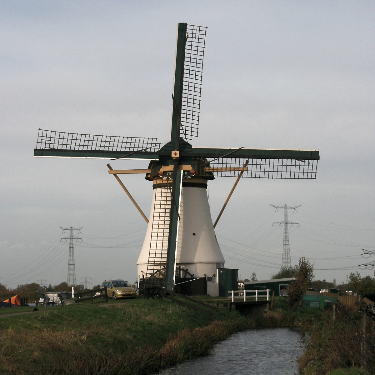 Alblasserdam: Kortlandse Molen